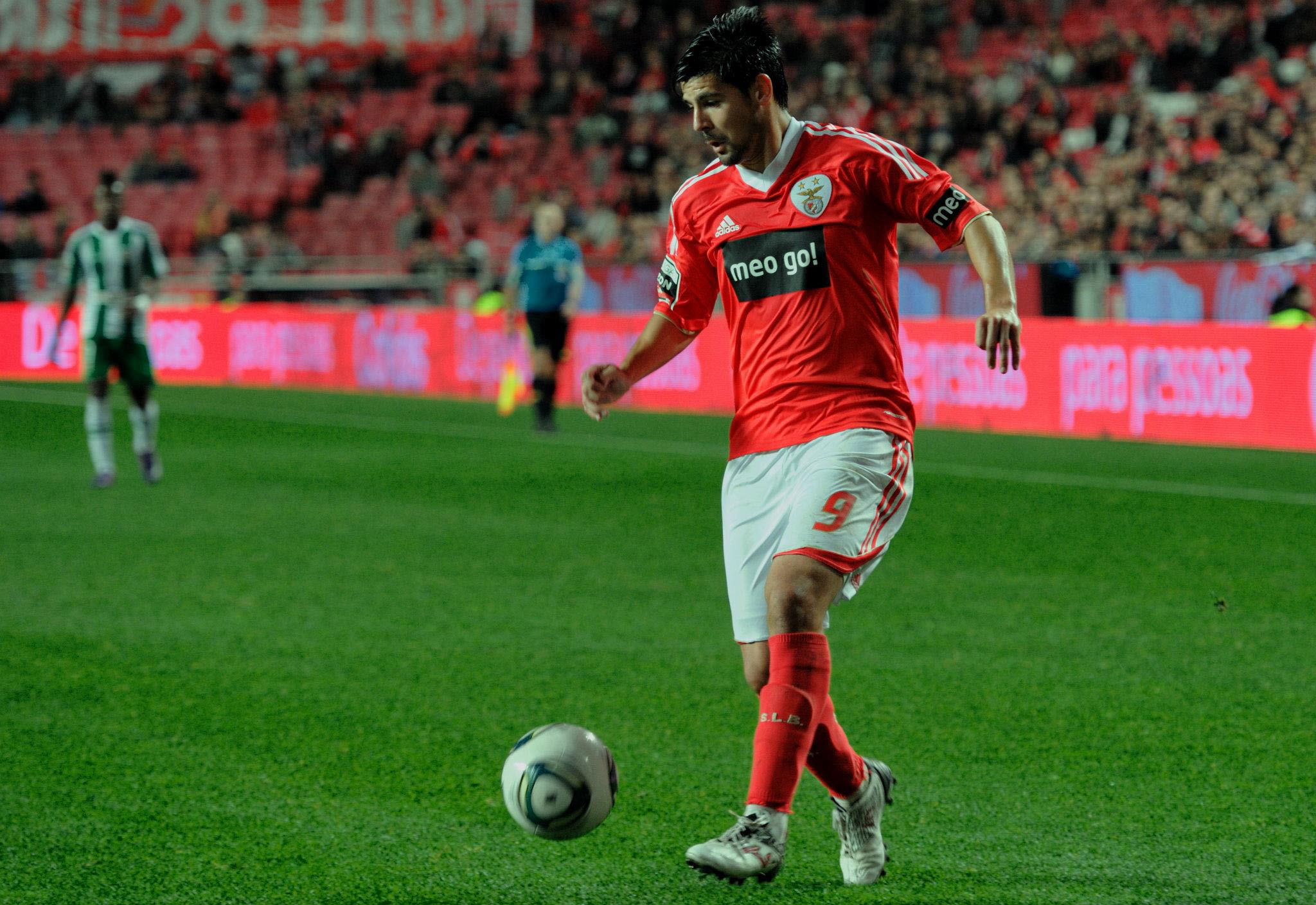 Nolito